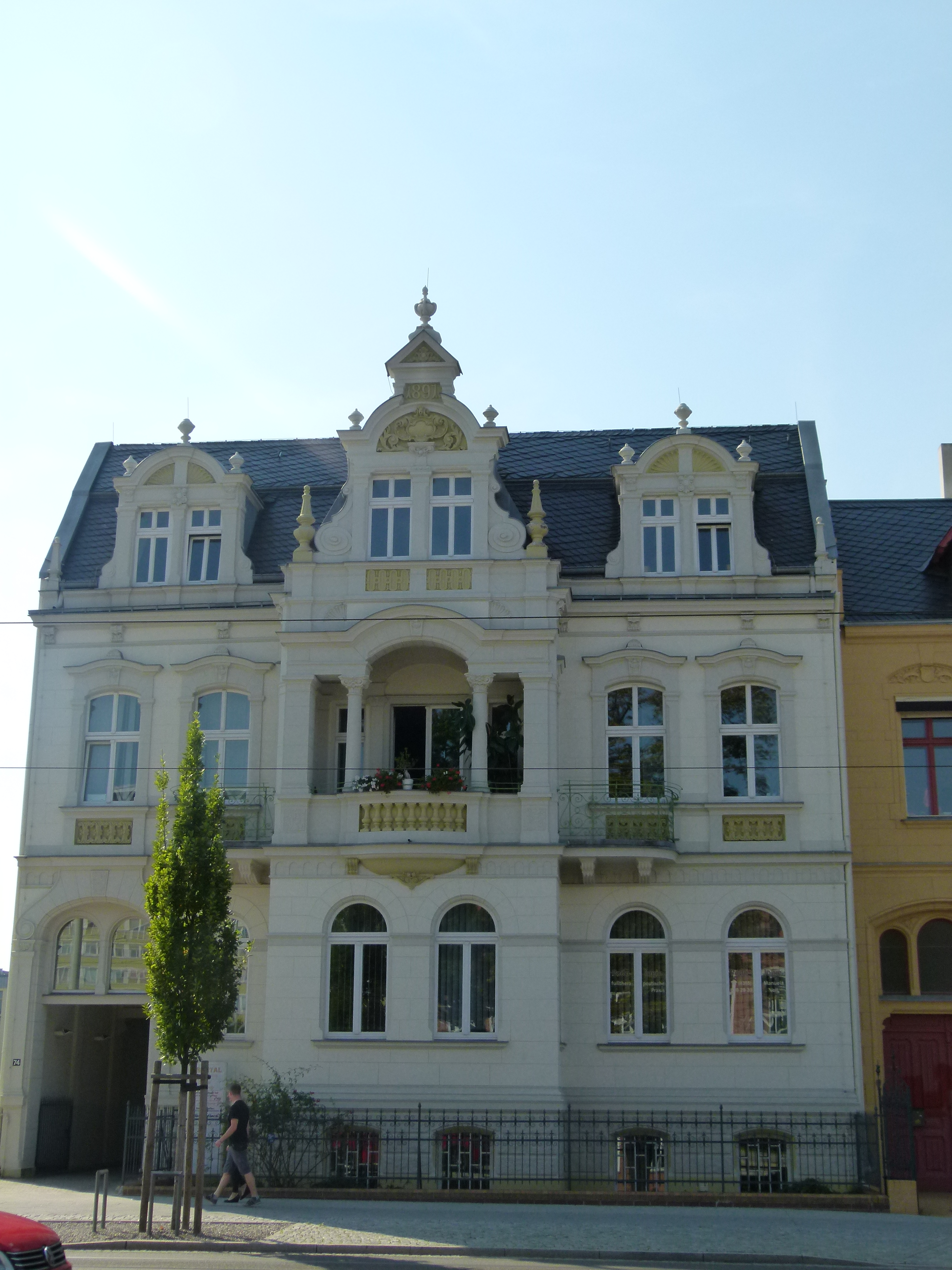 74 Bahnhofstraße 2014